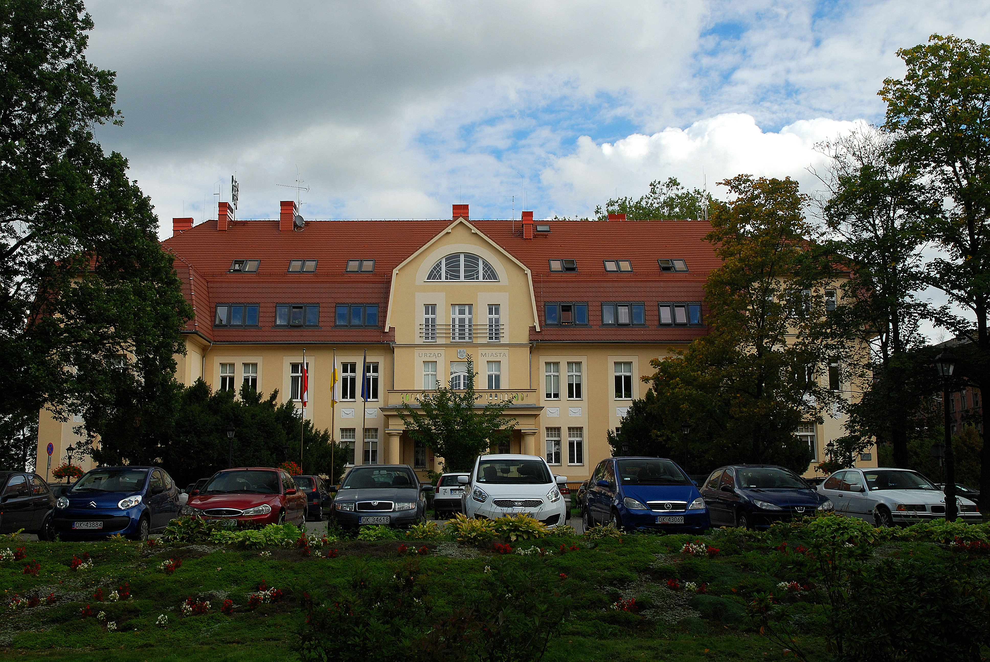 Kędzierzyn-Koźle budynek administracyjny, ob. Urząd Miasta widok od strony ul. Żeromskiego OP